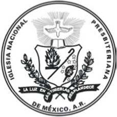 Escudo de la Iglesia Nacional Presbiteriana de Mexico, A.R.